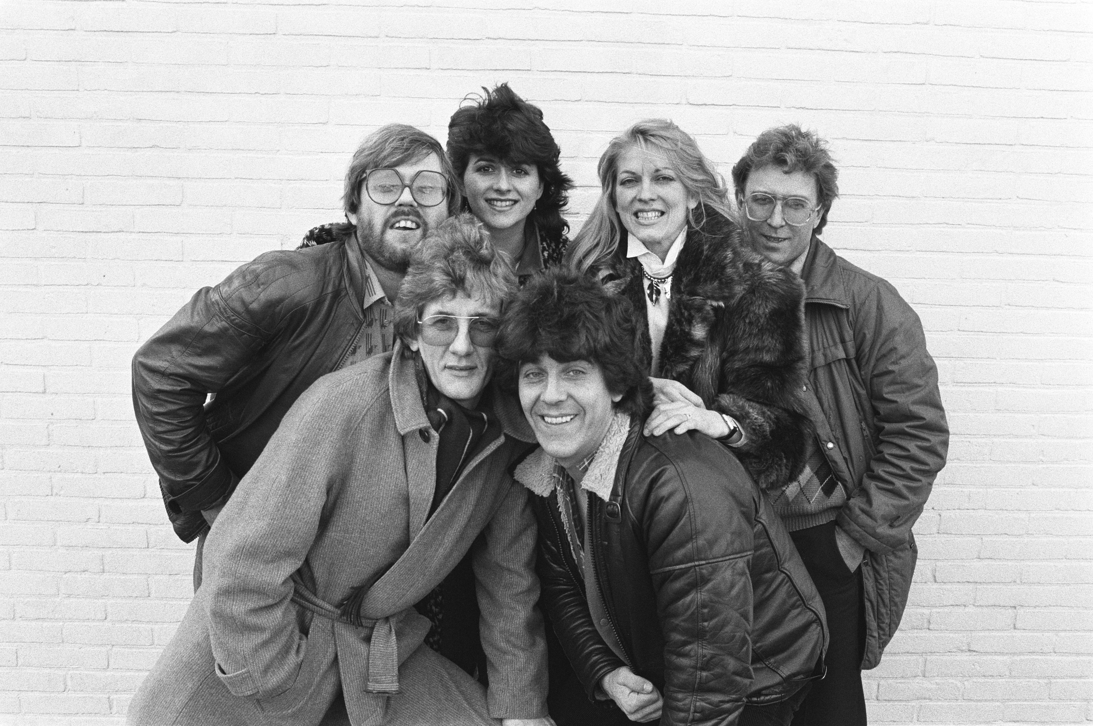 Collectie / Archief : Fotocollectie Anefo Reportage / Serie : [ onbekend ] Beschrijving : Repetities Nationaal Songfestival in Scheveningen. Datum : 23 februari 1982 Locatie : Scheveningen, Zuid-Holland Trefwoorden : REPETITIES, deelnemers Instellingsnaam : Nationaal Songfestival Fotograaf : Antonisse, Marcel / Anefo Auteursrechthebbende : Nationaal Archief Materiaalsoort : Negatief (zwart/wit) Nummer archiefinventaris : bekijk toegang 2.24.01.05 Bestanddeelnummer : 931-9960